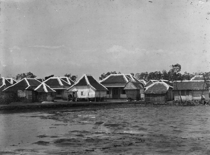 Foto. Het dorp Pangoong met bidhuisje en rijstschuur, op de voorgrond een drooggelopen visvijver